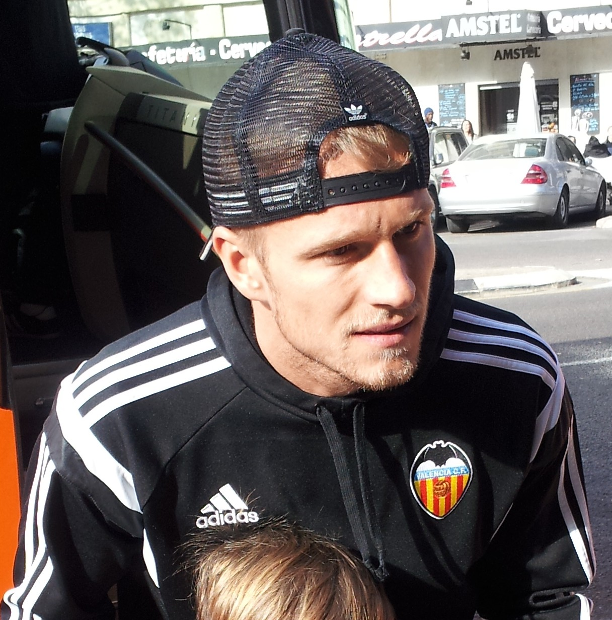 Prèvia VCF-RCDE de Copa.